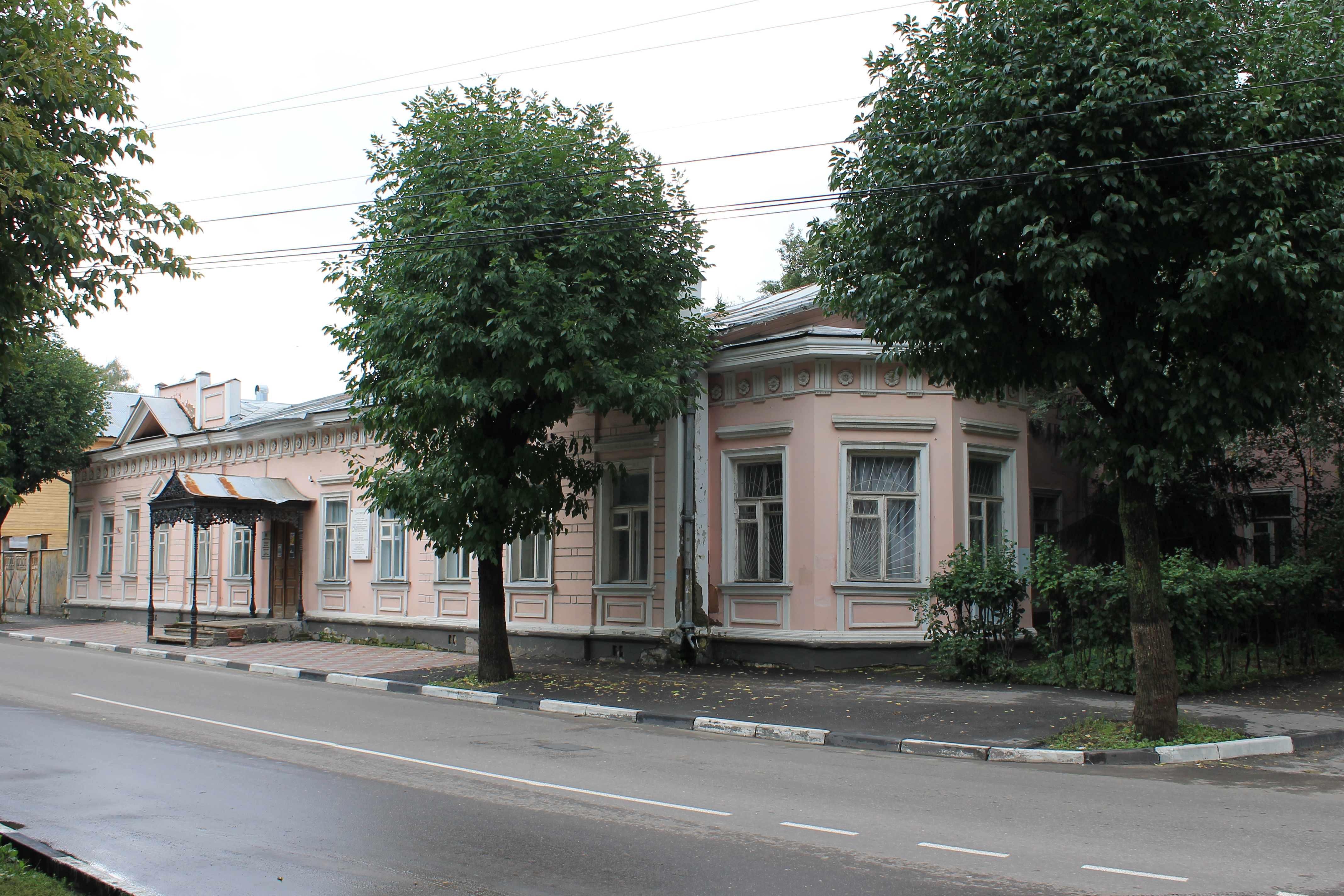 Рязань. Дом губенатора. Улица Свобода, дом № 79